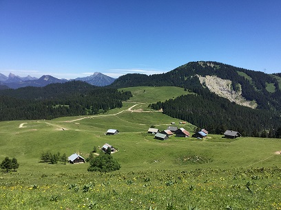 l'alpage de trélesaix